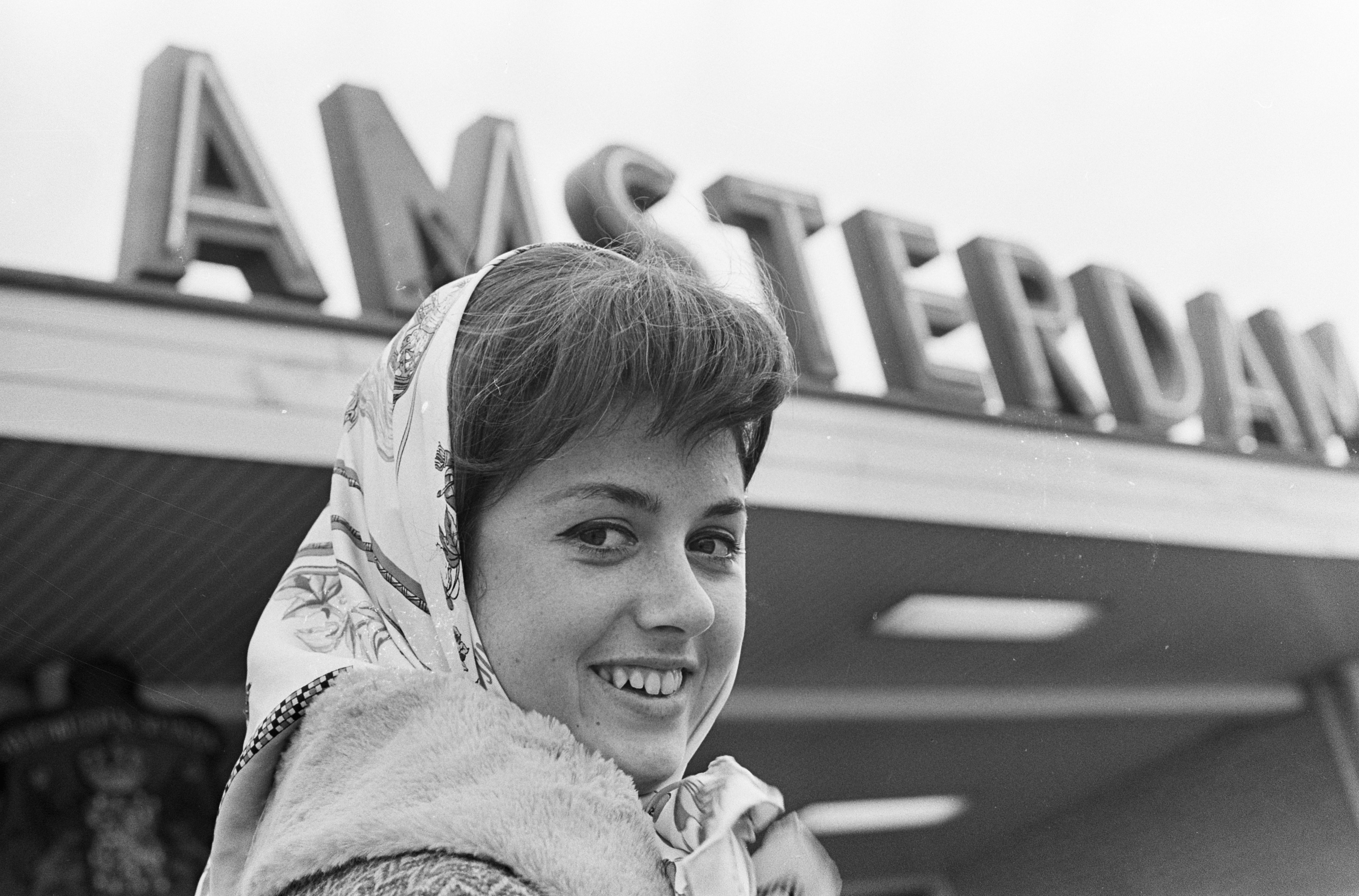 Collectie / Archief : Fotocollectie Anefo Reportage / Serie : [ onbekend ] Beschrijving : Aankomst Gigliola Cinquetti op Schiphol Datum : 31 maart 1966 Locatie : Noord-Holland, Schiphol Trefwoorden : vliegvelden, zangeressen, zangers Persoonsnaam : Cinquetti, Gigliola Fotograaf : Kroon, Ron / Anefo Auteursrechthebbende : Nationaal Archief Materiaalsoort : Negatief (zwart/wit) Nummer archiefinventaris : bekijk toegang 2.24.01.05 Bestanddeelnummer : 918-9826